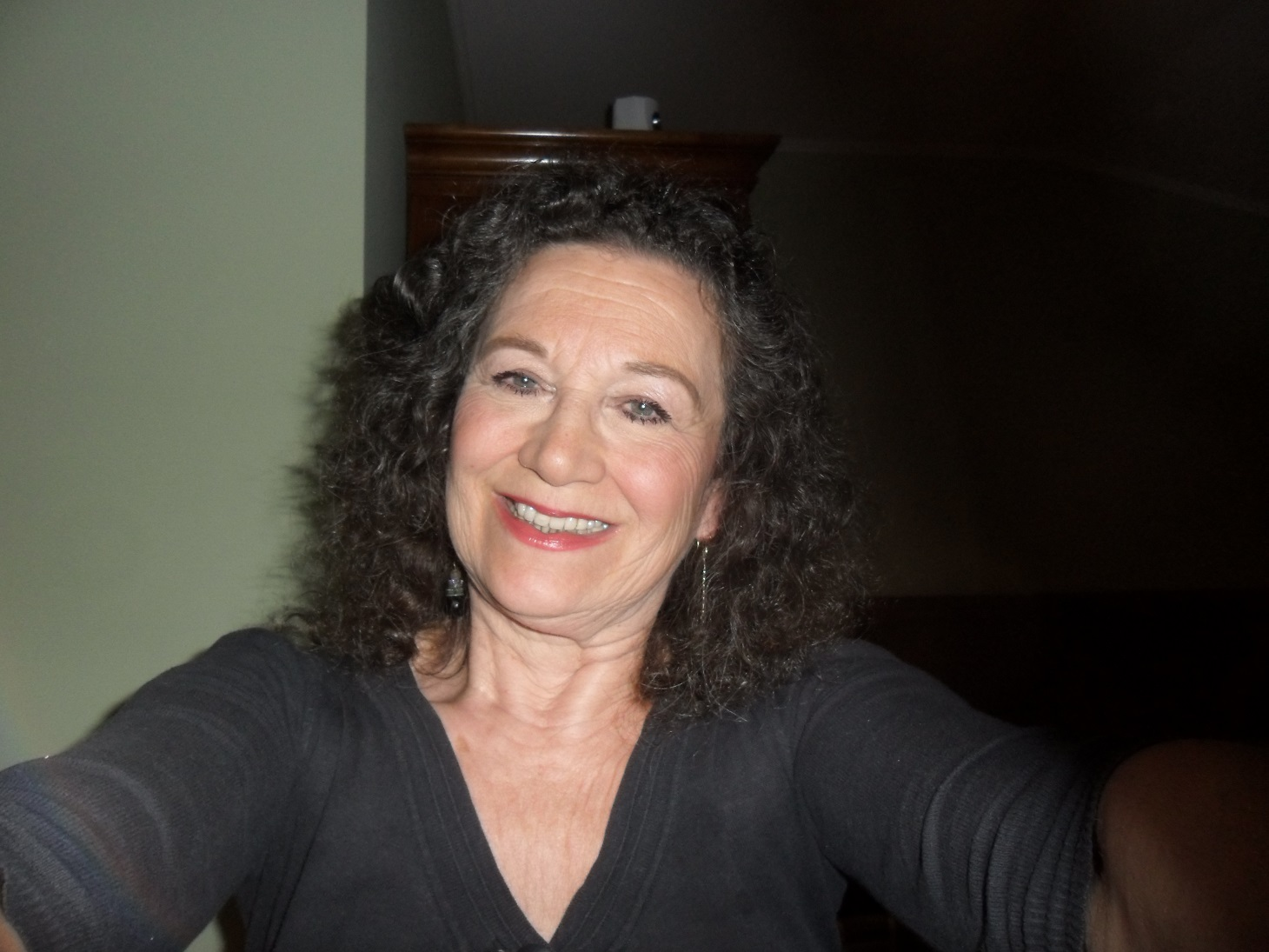 Franca Porciani, giornalista e scrittrice